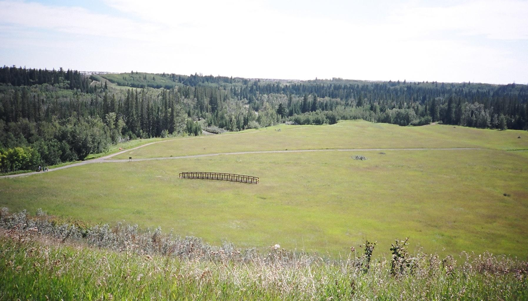 Fotis Paul Hopkins, julio 2005. (Fortega pluvado dum junio 2005 damaĝis multajn pontojn de la parko; oni alportis tiun meze de ĉi tiu kampo en la sudo de la parko por riparado.)